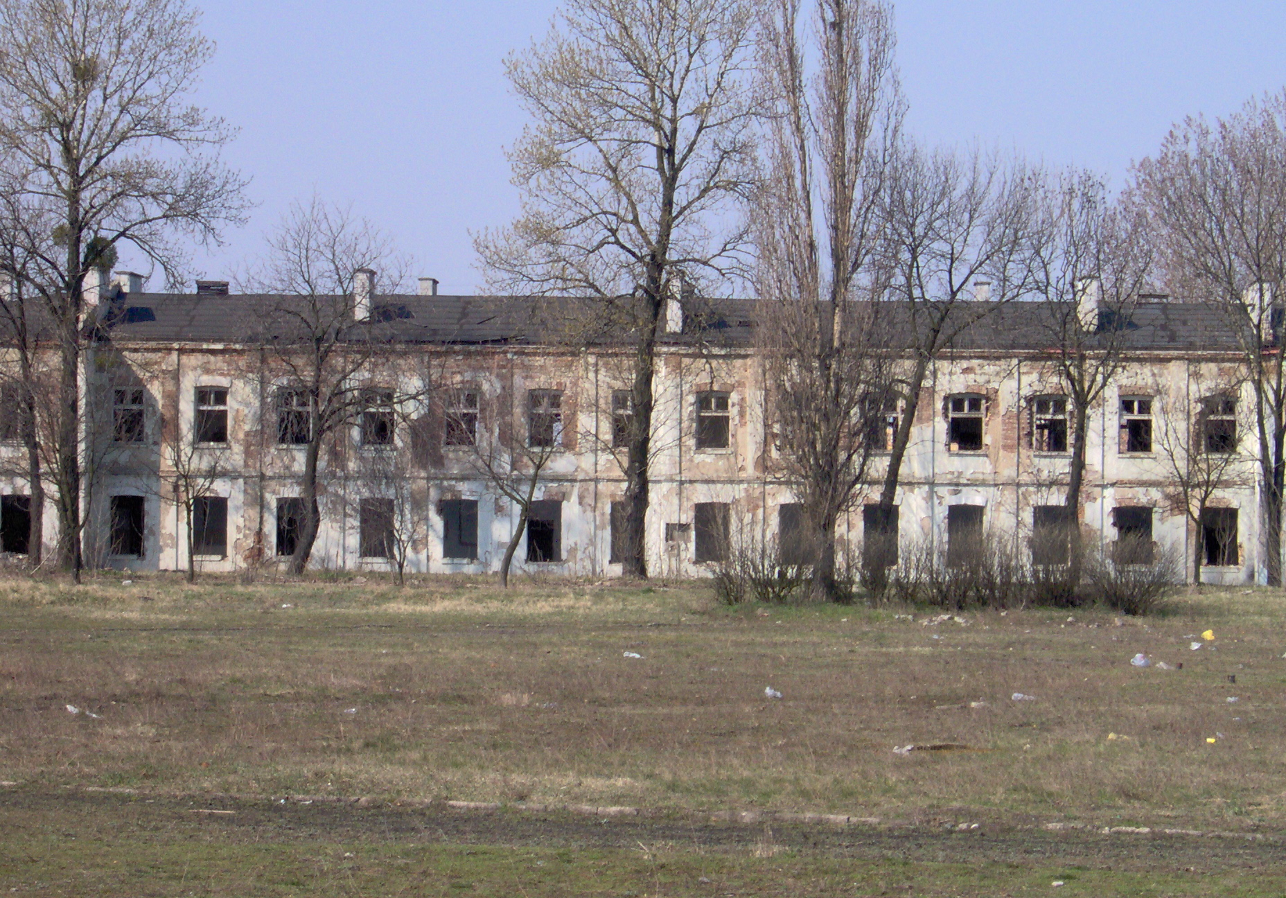 Pozostałości po byłej jednostki wojskowej przy ul. Żytniej 83 (2007 r.)